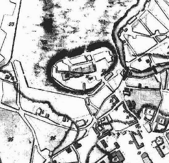 Замчышча на плане Мінска 1790 г.